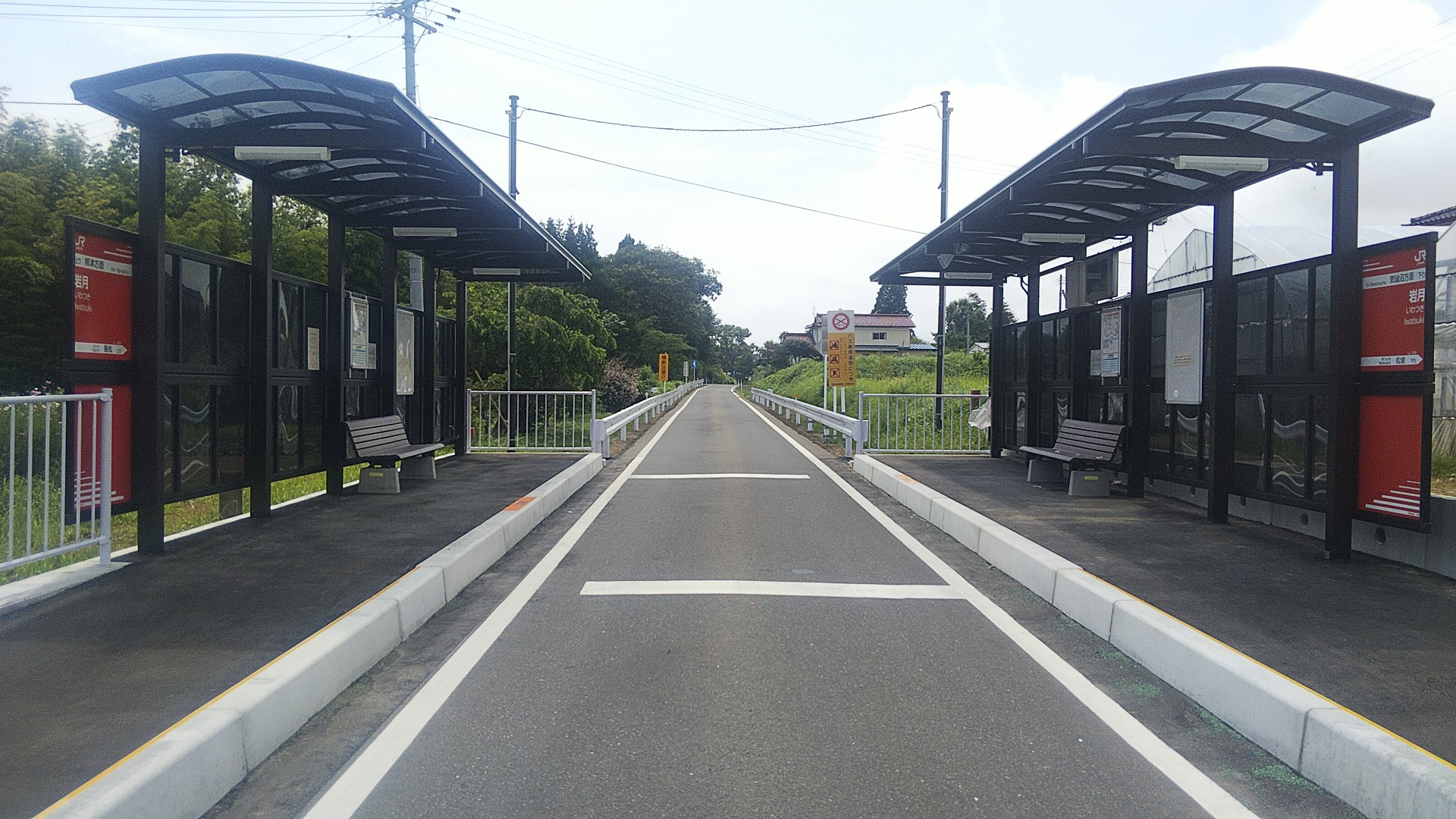 岩月駅BRTホーム